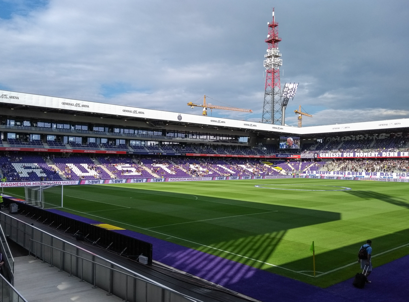 Generali-Arena beim Eröffnungsspiel am 13.7.2018